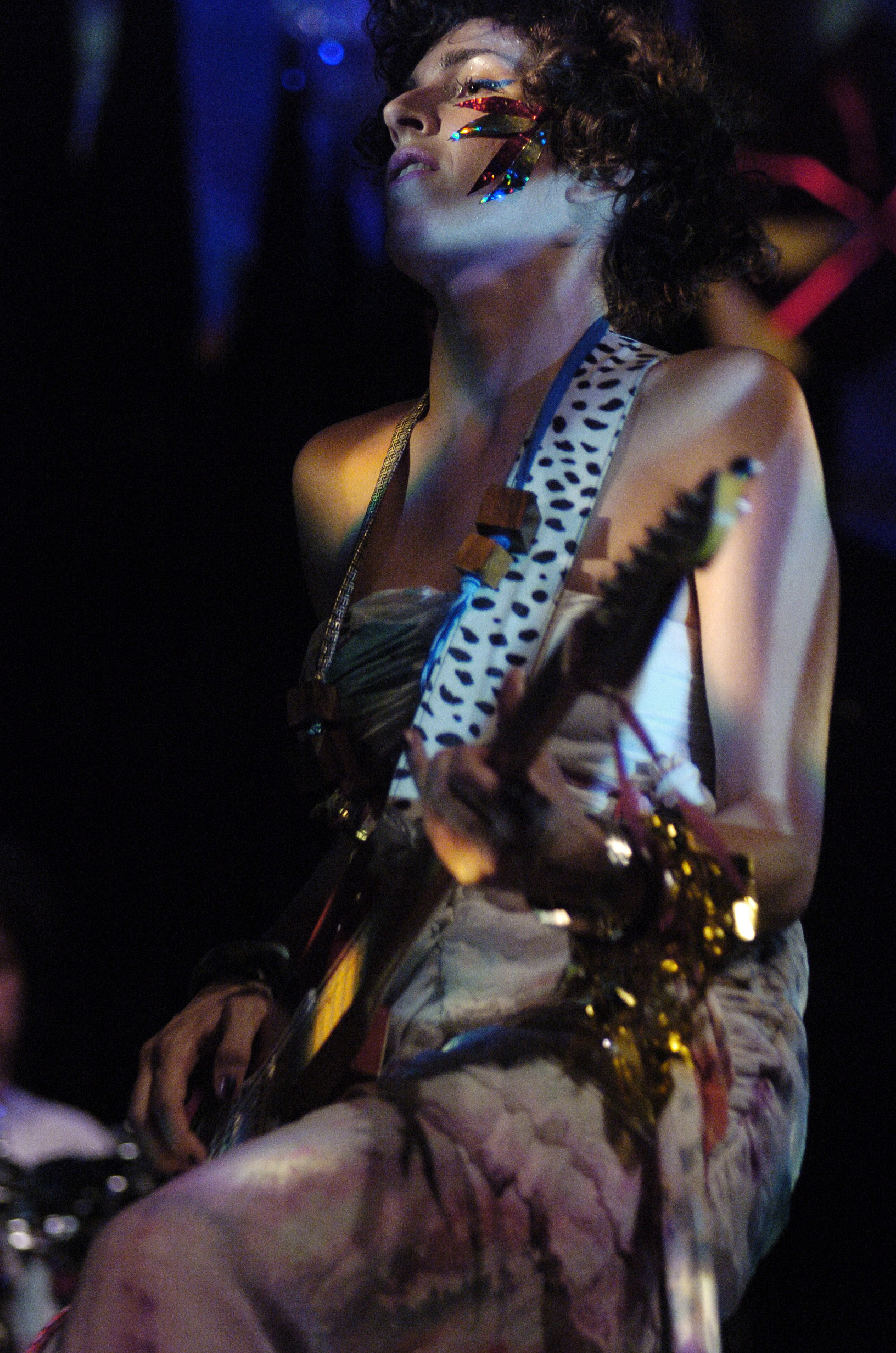 Cibelle no Auditório Ibirapuera. São Paulo. Brasil. 02/11/2007. Foto: Gerardo Lazzari